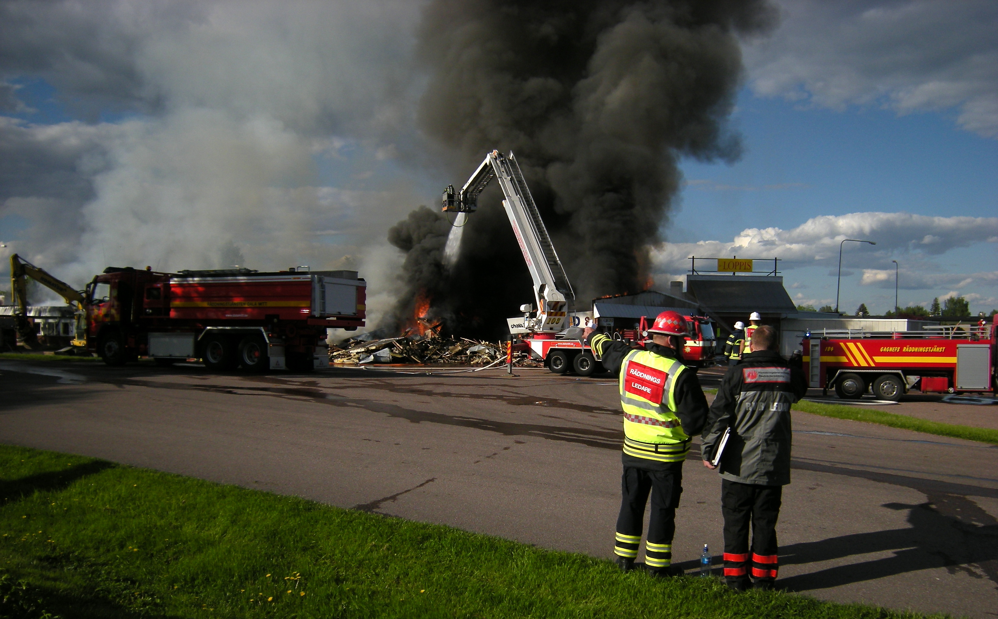 Räddningsledare och restvärdesräddare, Borlänge, Dalarna